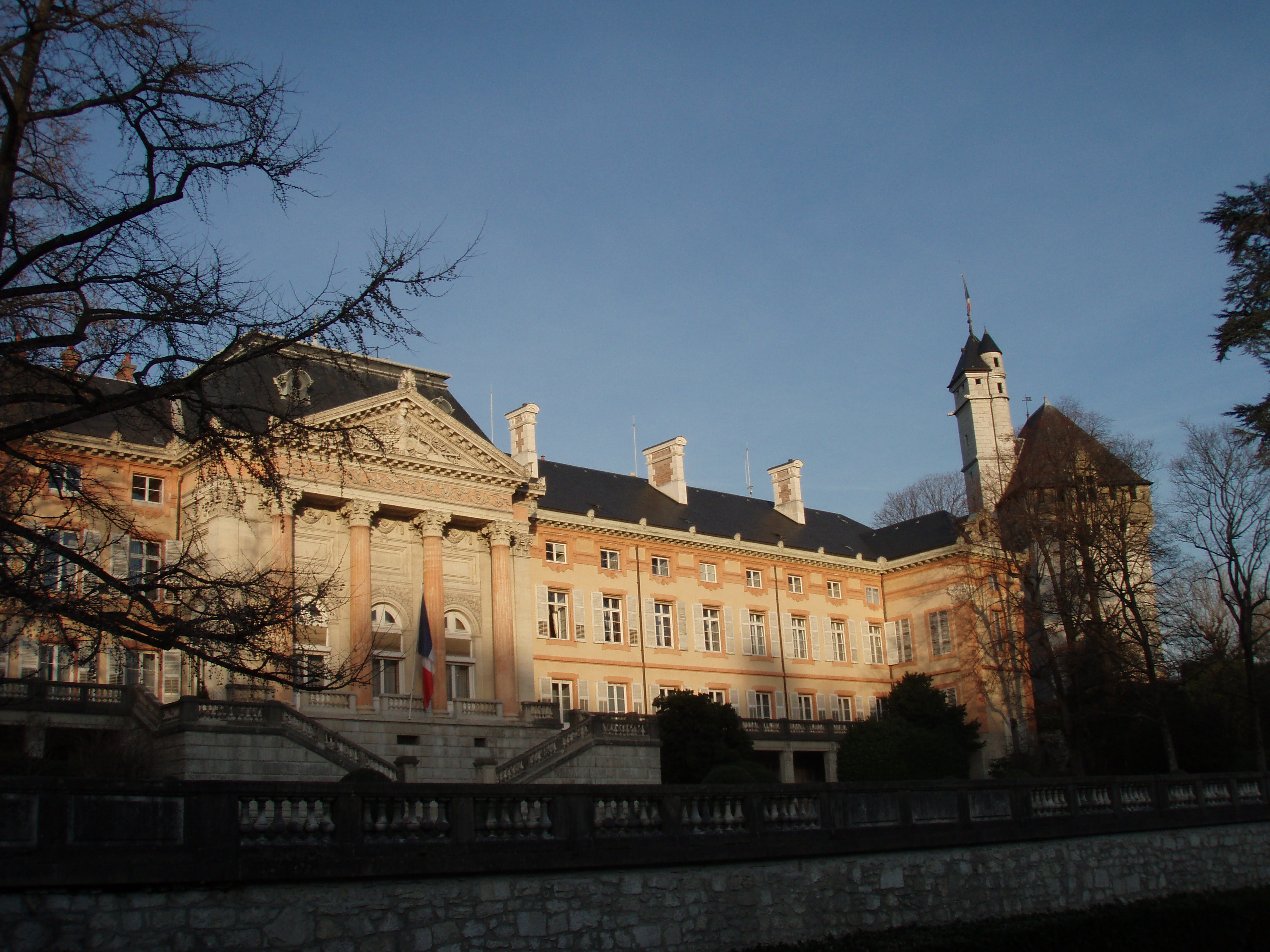 Façade Napoléon III du château de Chambéry. A droite, la Tour des Archives (XVème siècle). Chambéry, Savoie, France.